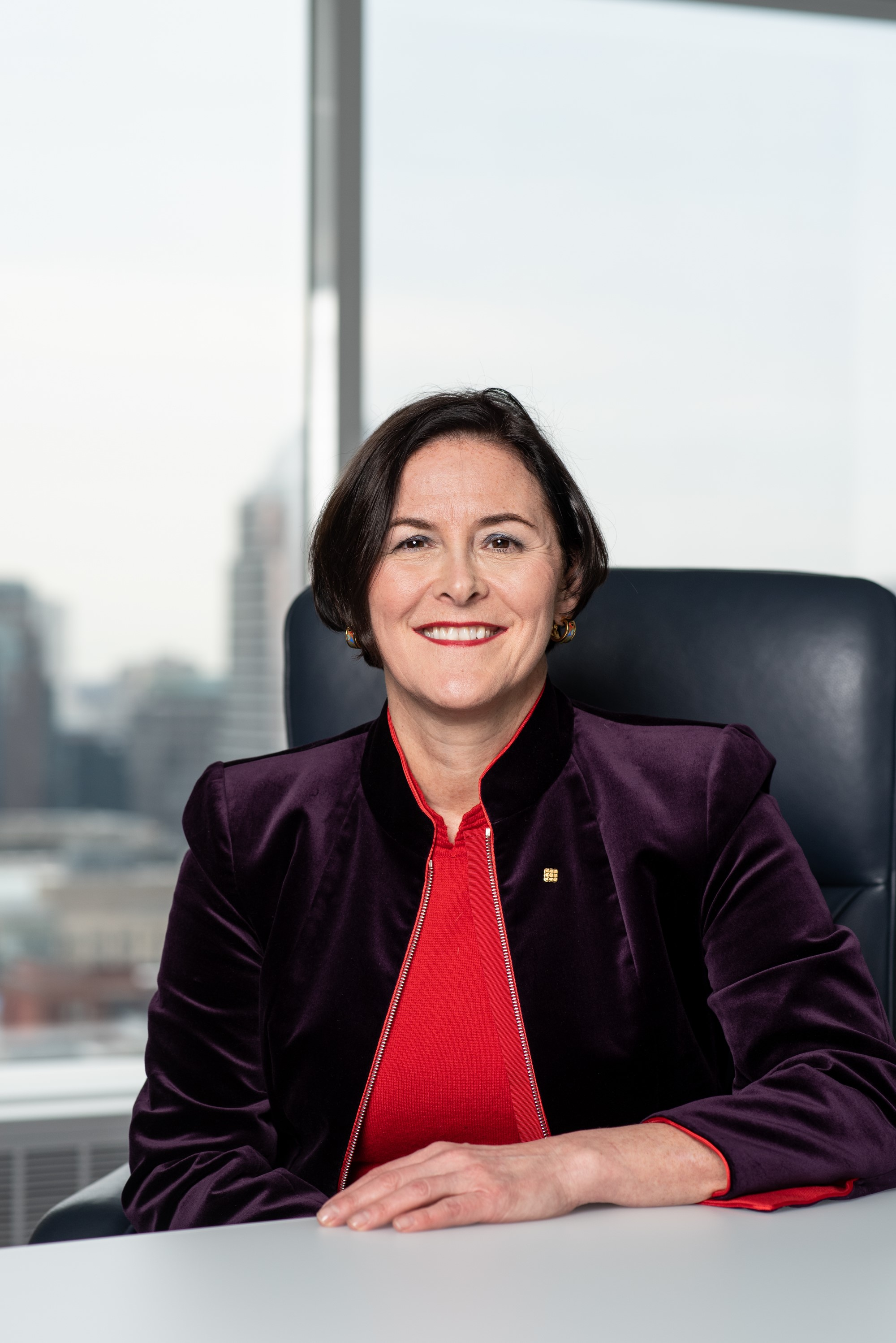 Dre Diane Francoeur, présidente de la FMSQ